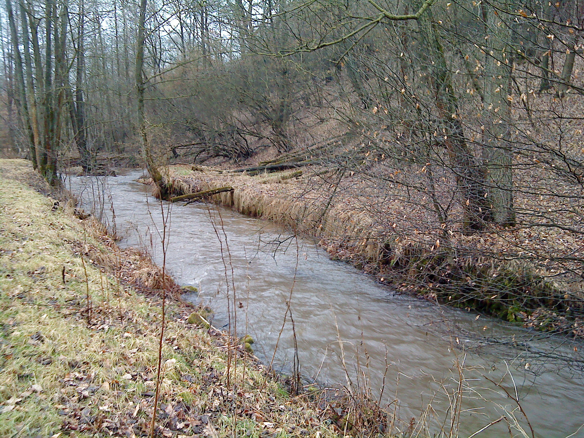 Der Lohrbach bei Neuhütten